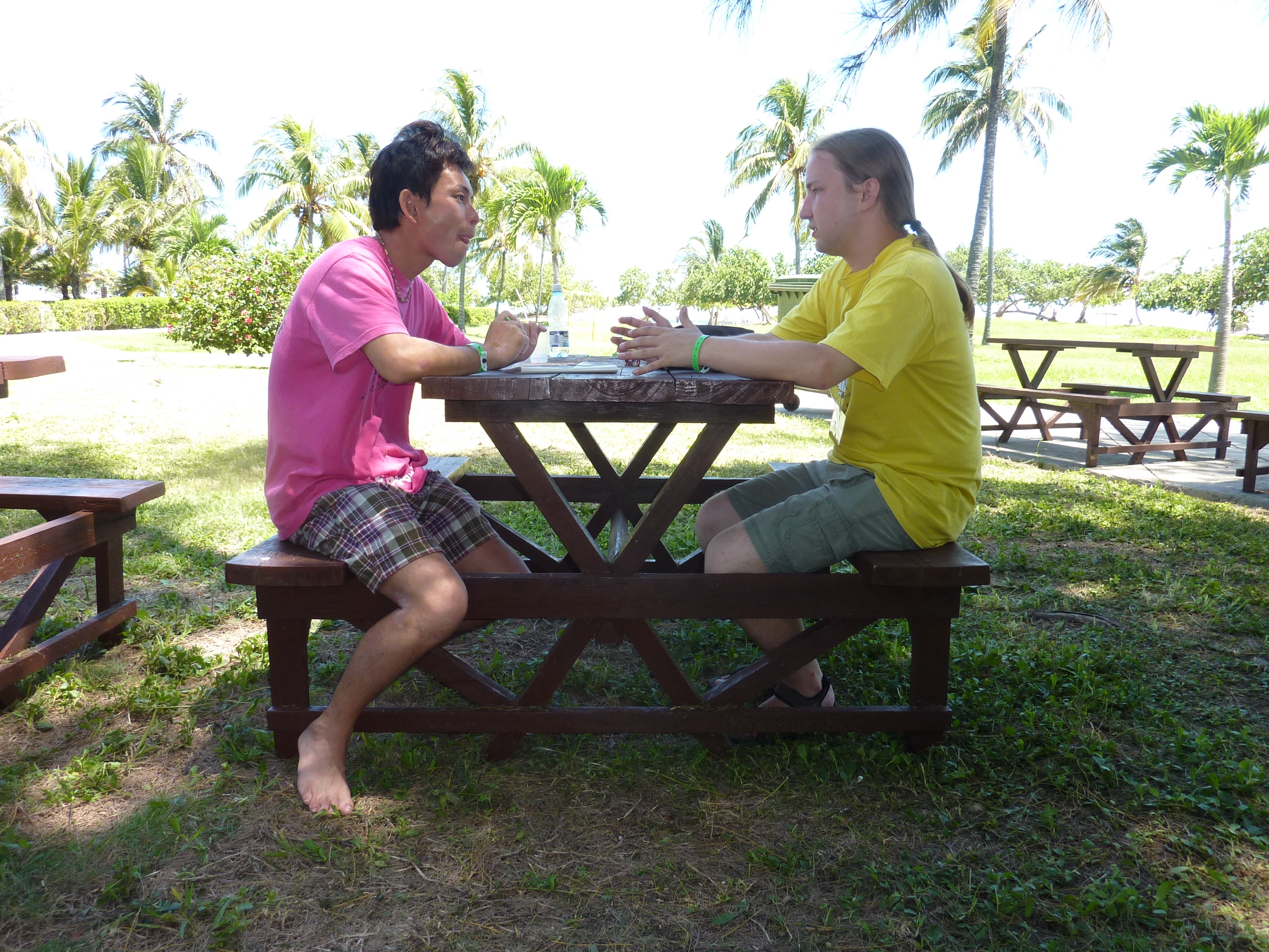 La TEJO-estrarano Łukasz Żebrowski (dekstre) diskutas dum la 66-a IJK (2010) en Kubo kun Okabe Akiumi, prezidanto de JEJ (maldekstre), pri la ebleco organizi en la jaro 2012 IJK-n en Japanio.